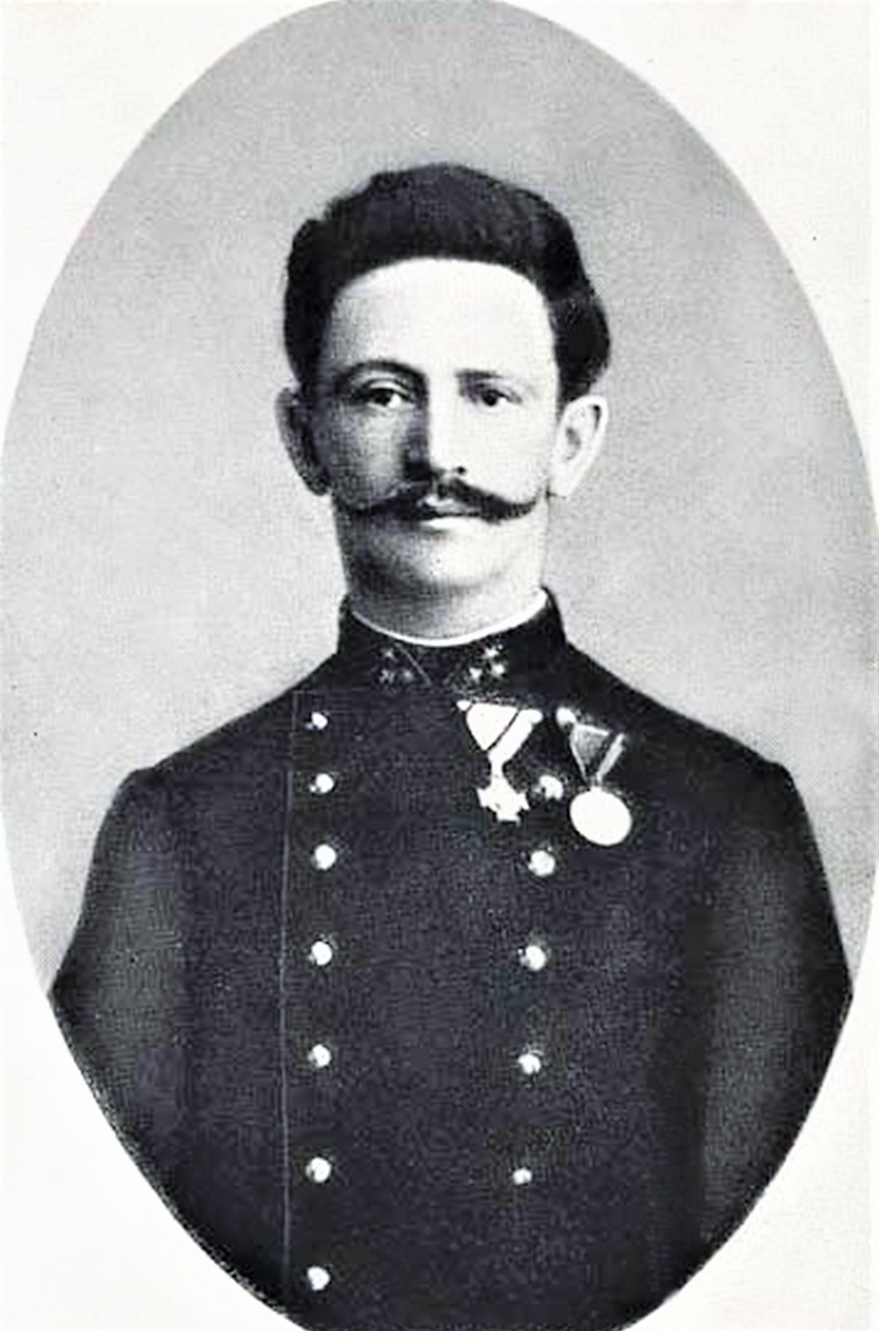 Franz Conrad von Hötzendorf als Hauptmann 1879